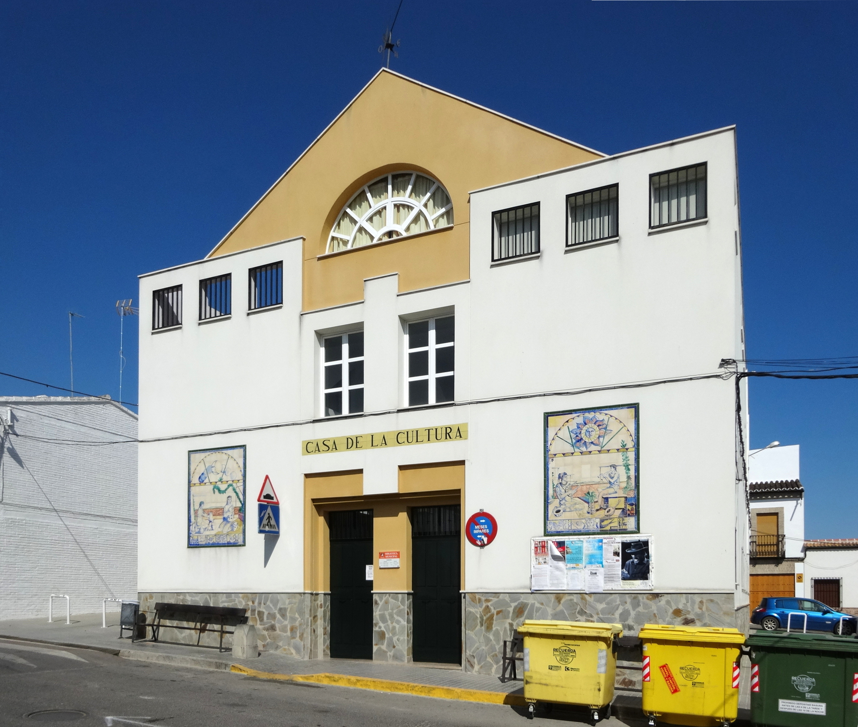 Casa de la Cultura de Montalbán de Córdoba (España).